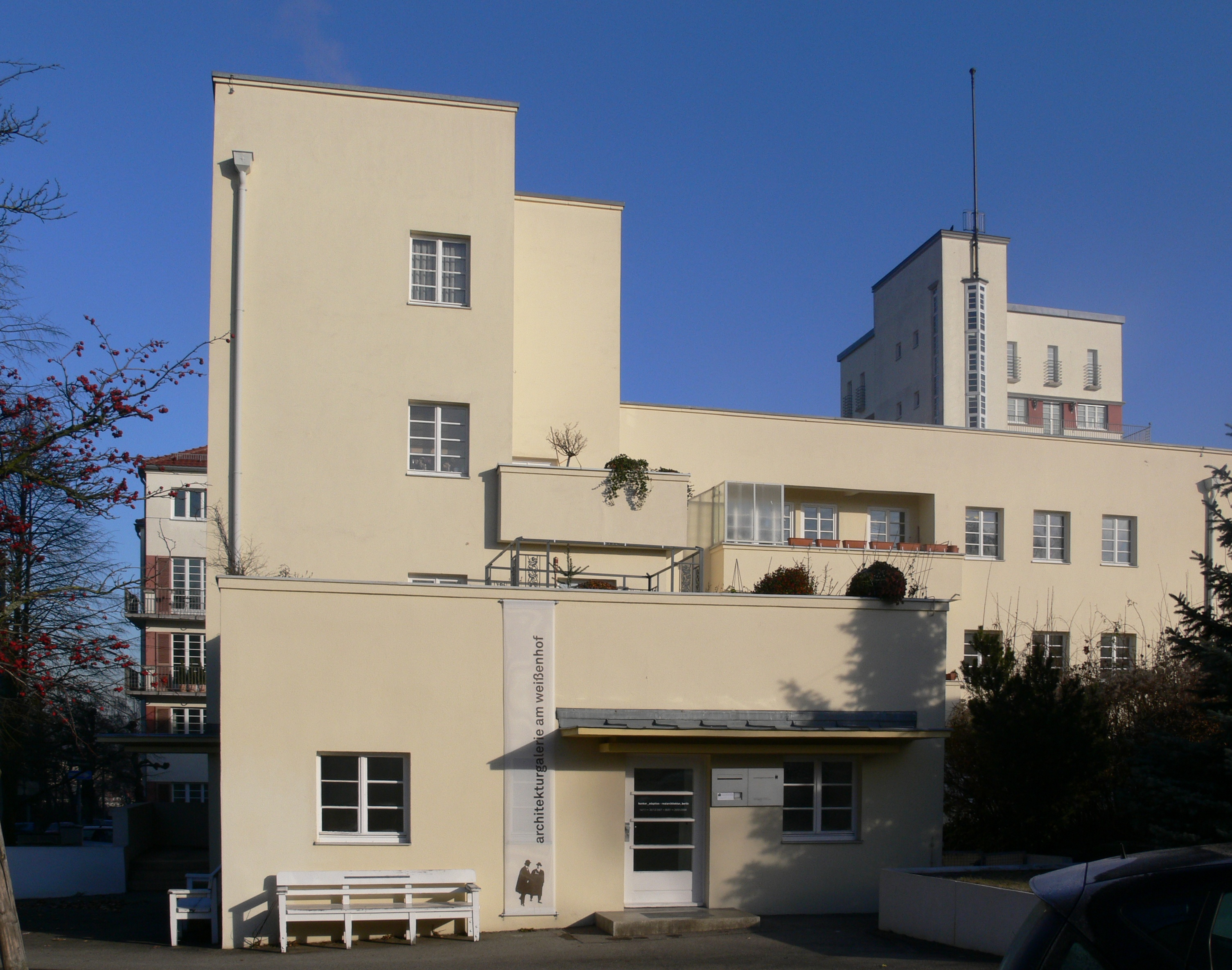 Stuttgart, Weißenhofsiedlung, Haus von Peter Behrens